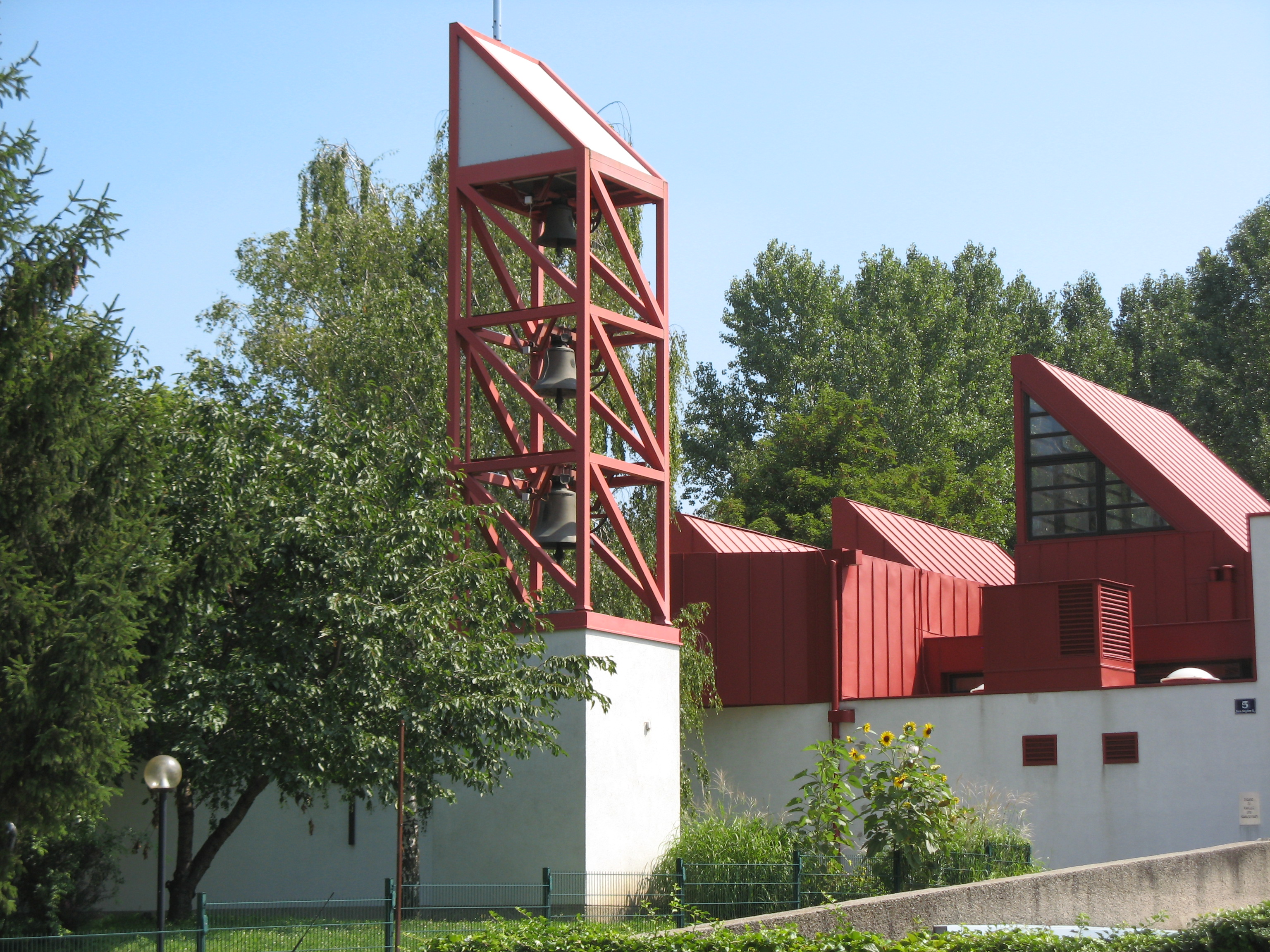 Pfarrkirche St. Paul (1973-75) von Armin Dolesch, Jura-Soyfer-Gasse, Per-Albin-Hansson-Siedlung Ost, Wien-Favoriten